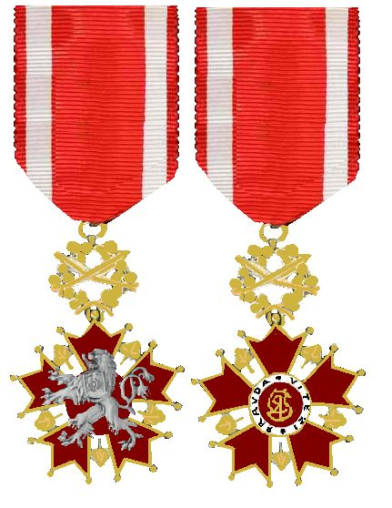 Prde van de CSSR